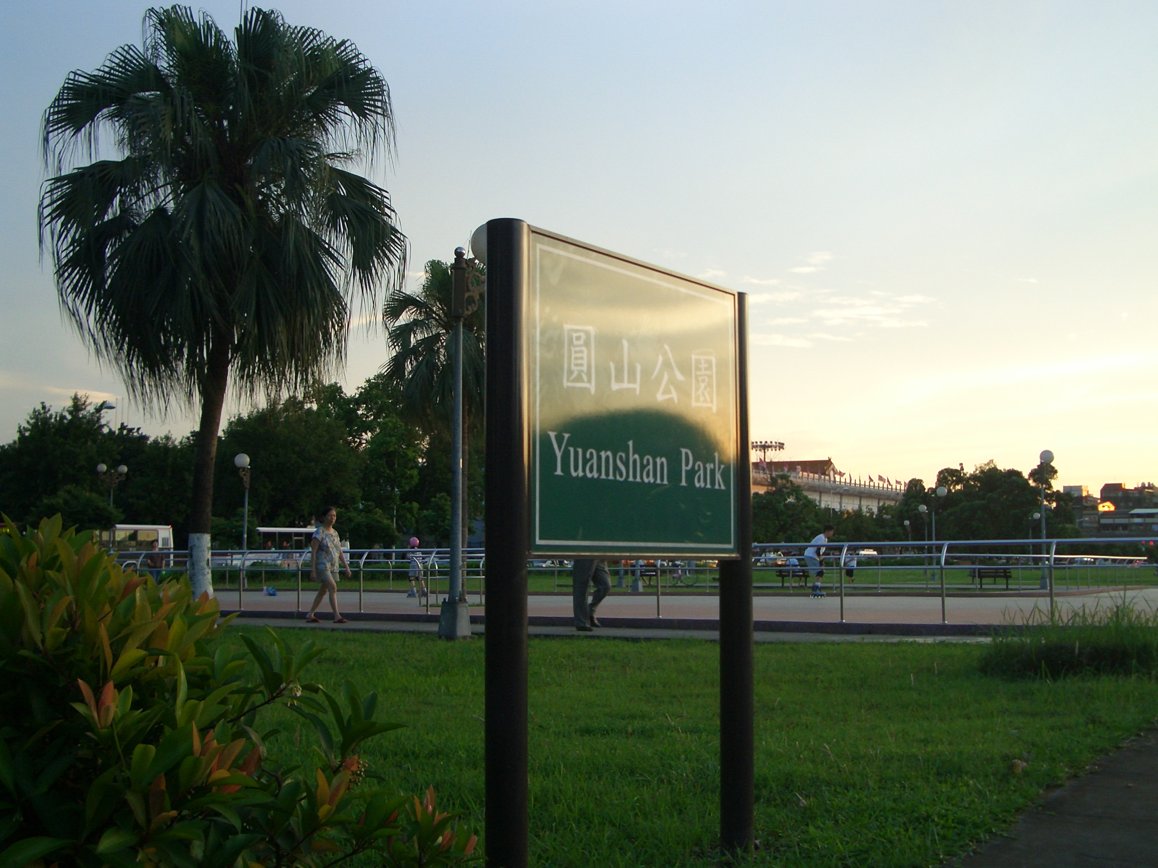 中華民國台灣台北市圓山公園